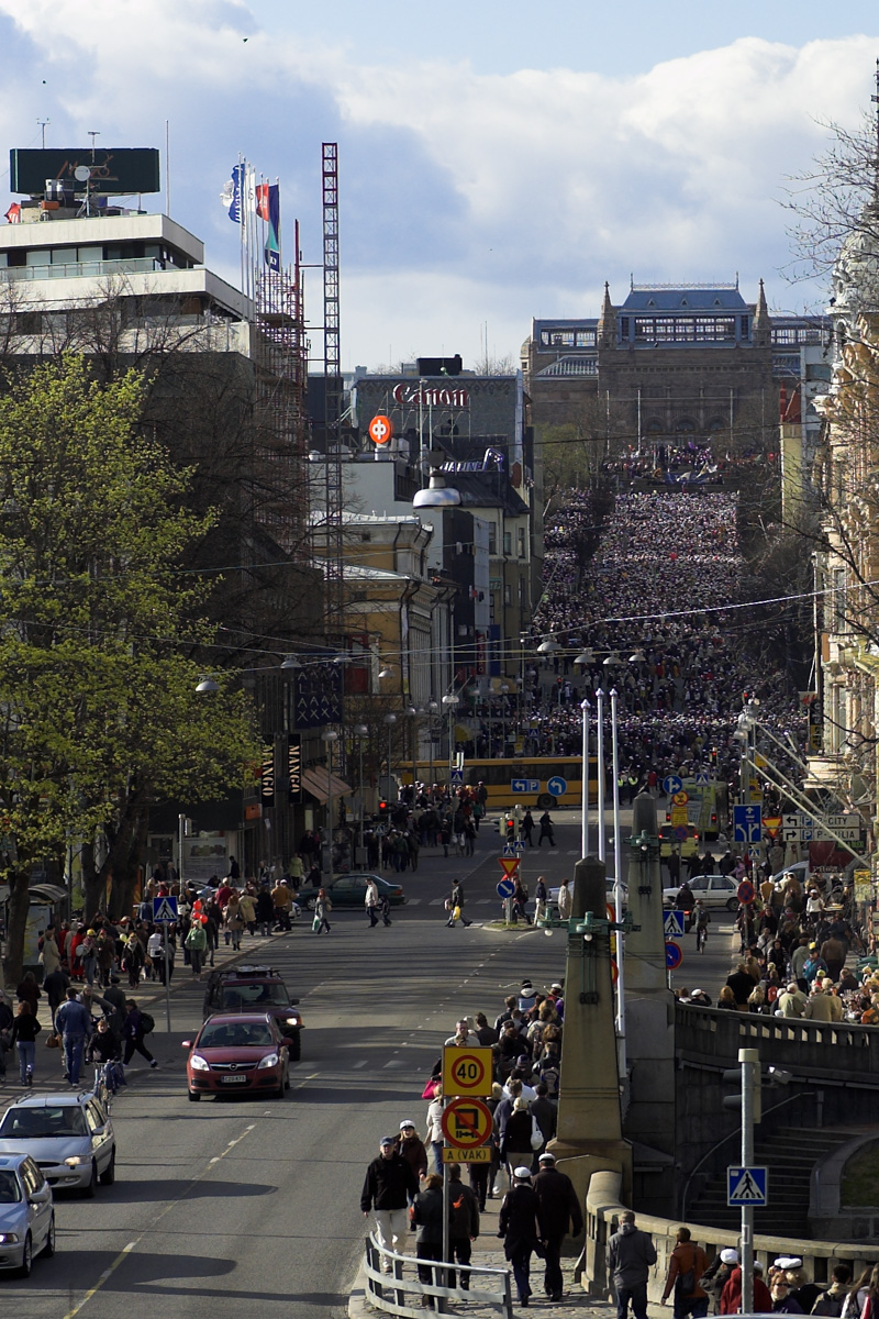 "Ylioppilaat, lakit päähän!" Turussa, Aurakadulla taidemuseon edessä